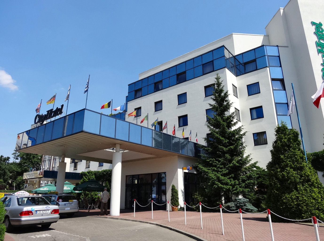 Hotel City w Bydgoszczy przy ul. 3 Maja